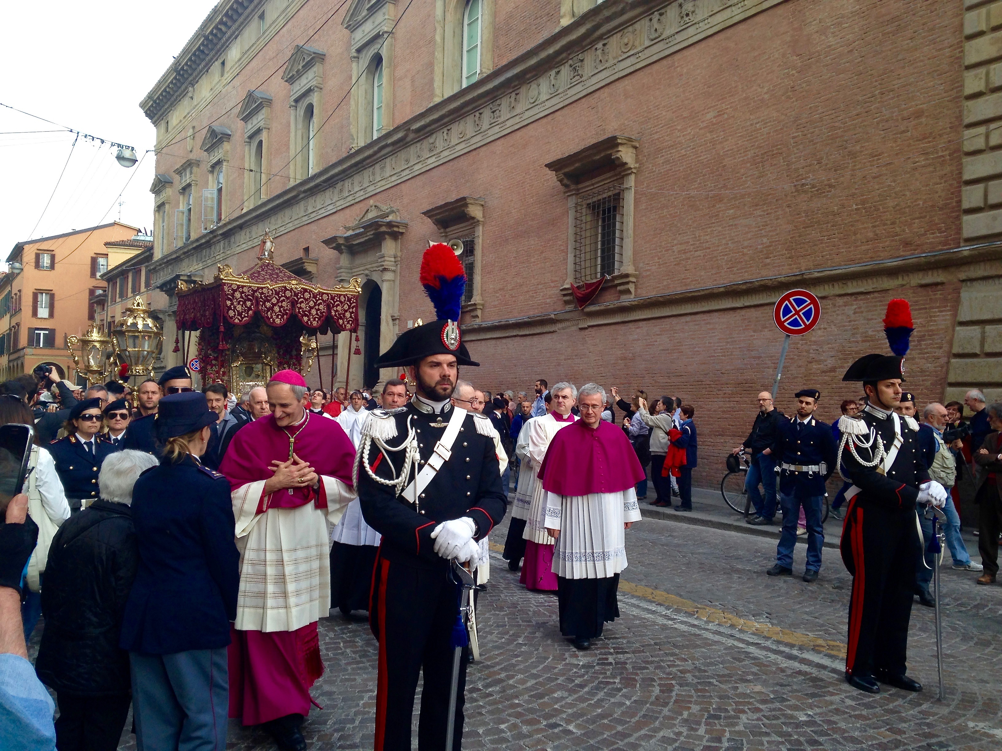 Processione dell'icona raffigurante la Madonna di San Luca a Bologna nel 2016